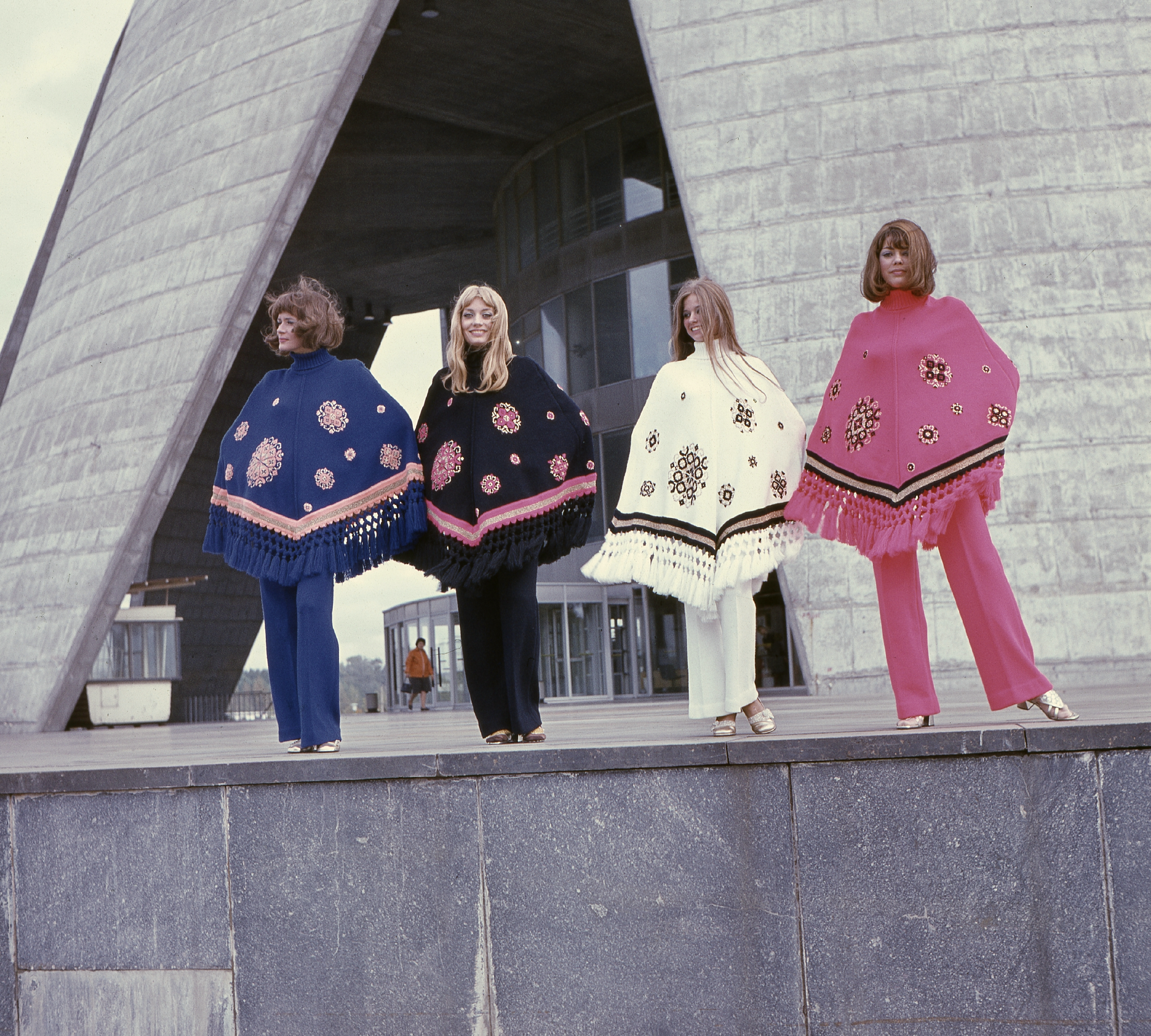 az Osztankinói tévétorony bejárata. Location: Russia, Moscow Tags: ad, women, fashion, TV tower, Soviet Union, colorful Title: az Osztankinói tévétorony bejárata.